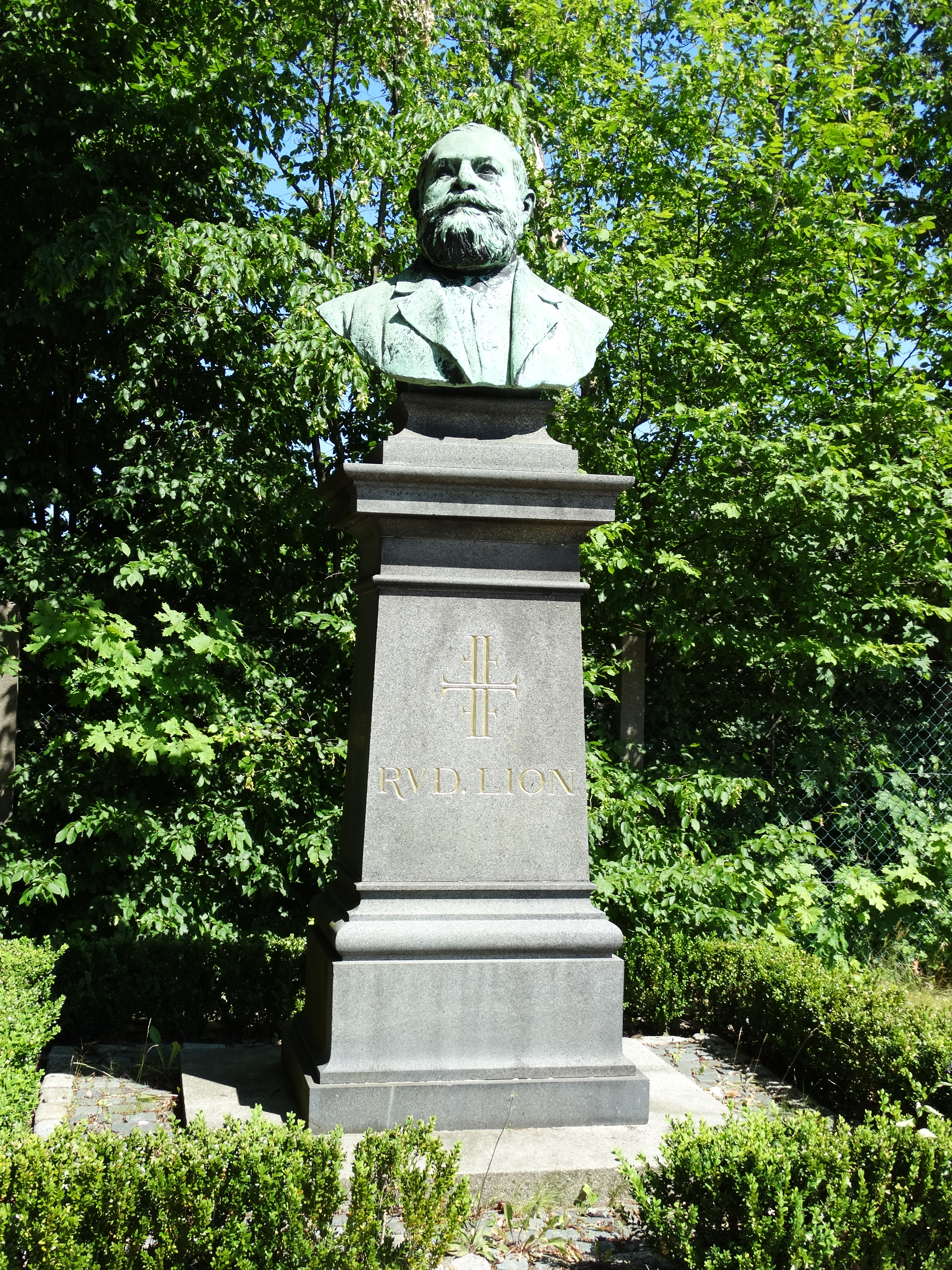 Loindenkmal auf dem Jahnsportplatz im Hofer Westendviertel